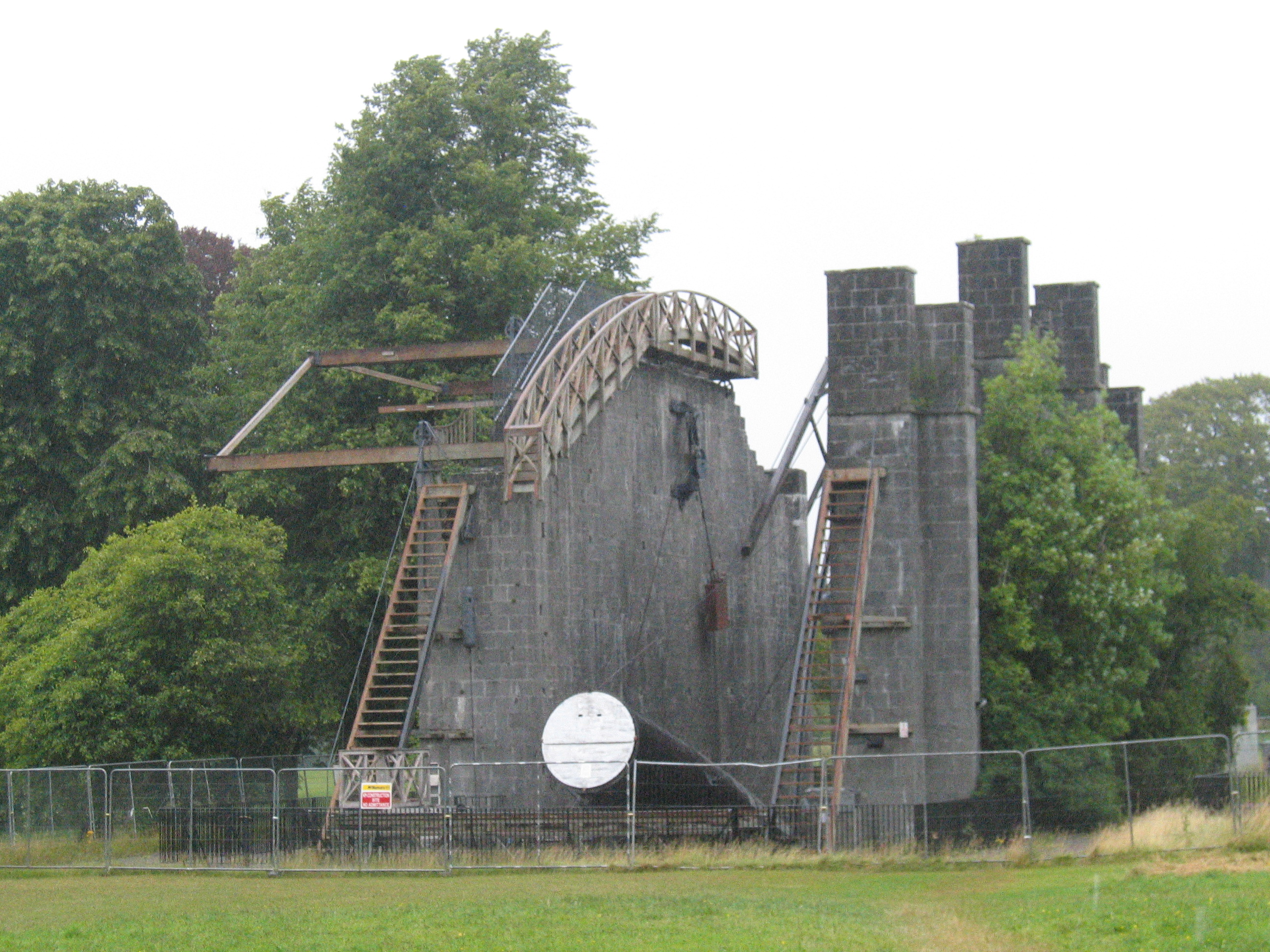 Teleskop in Birr (Vorderseite)